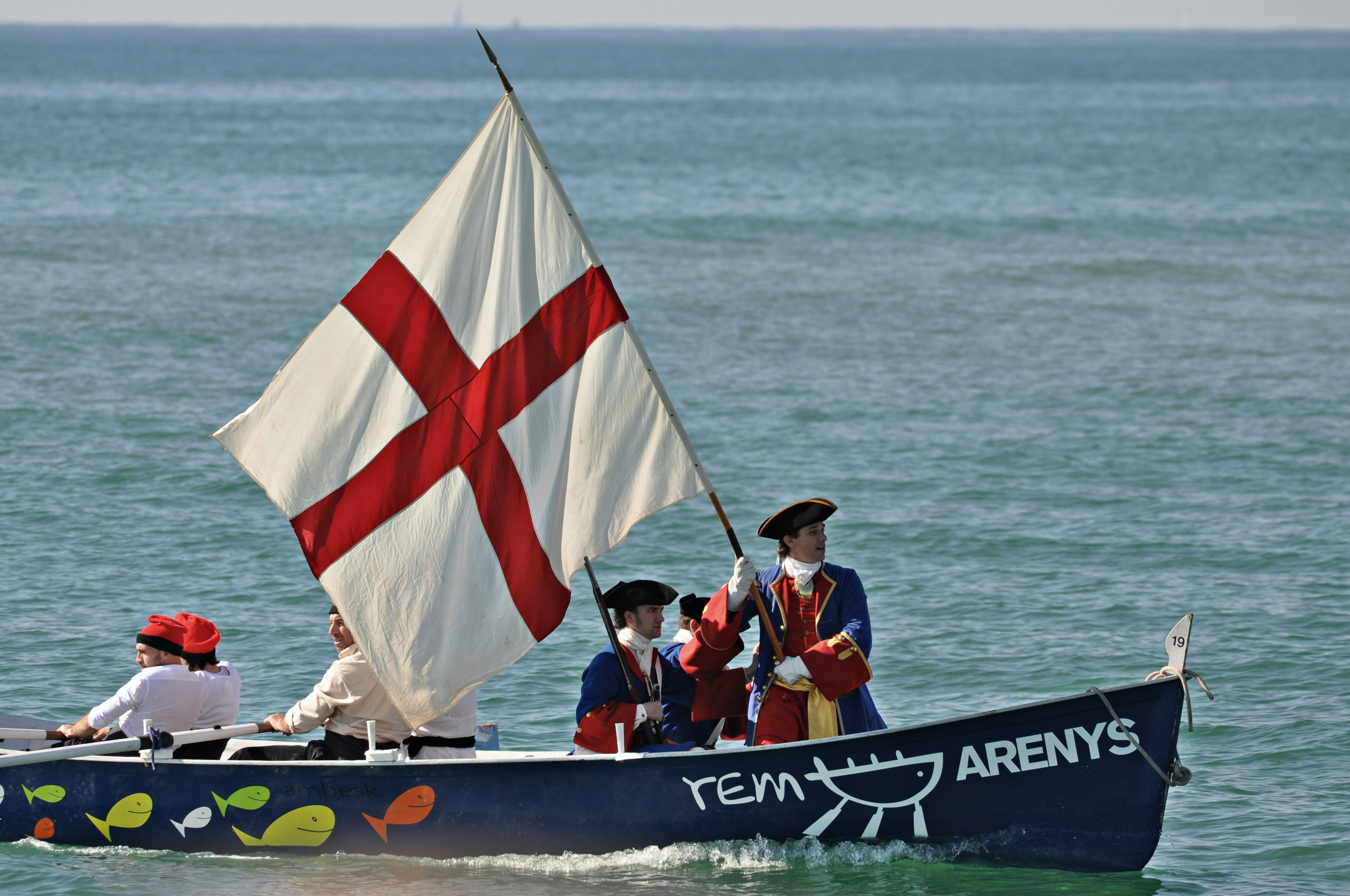 desembarco de los miquelets en arenys